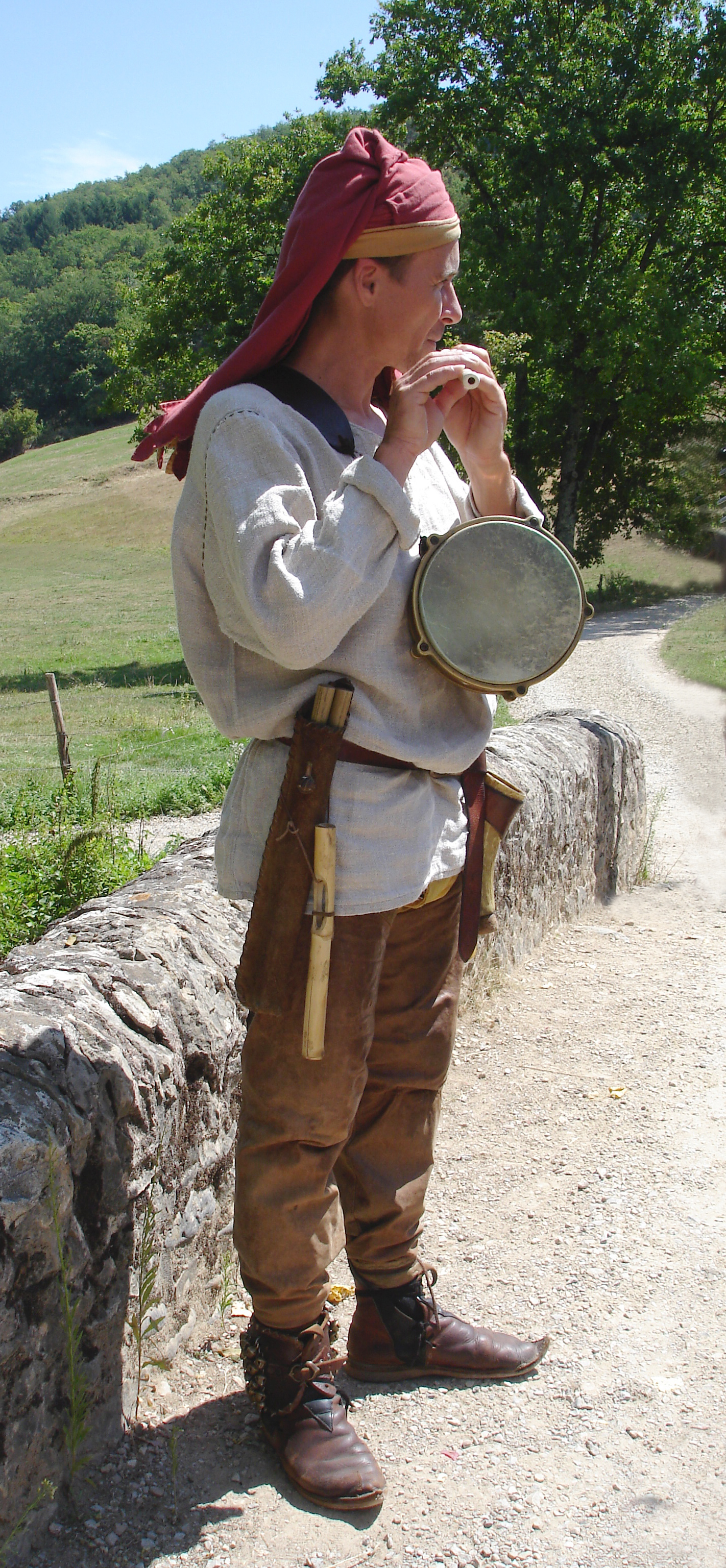 Ménestrel Espalion